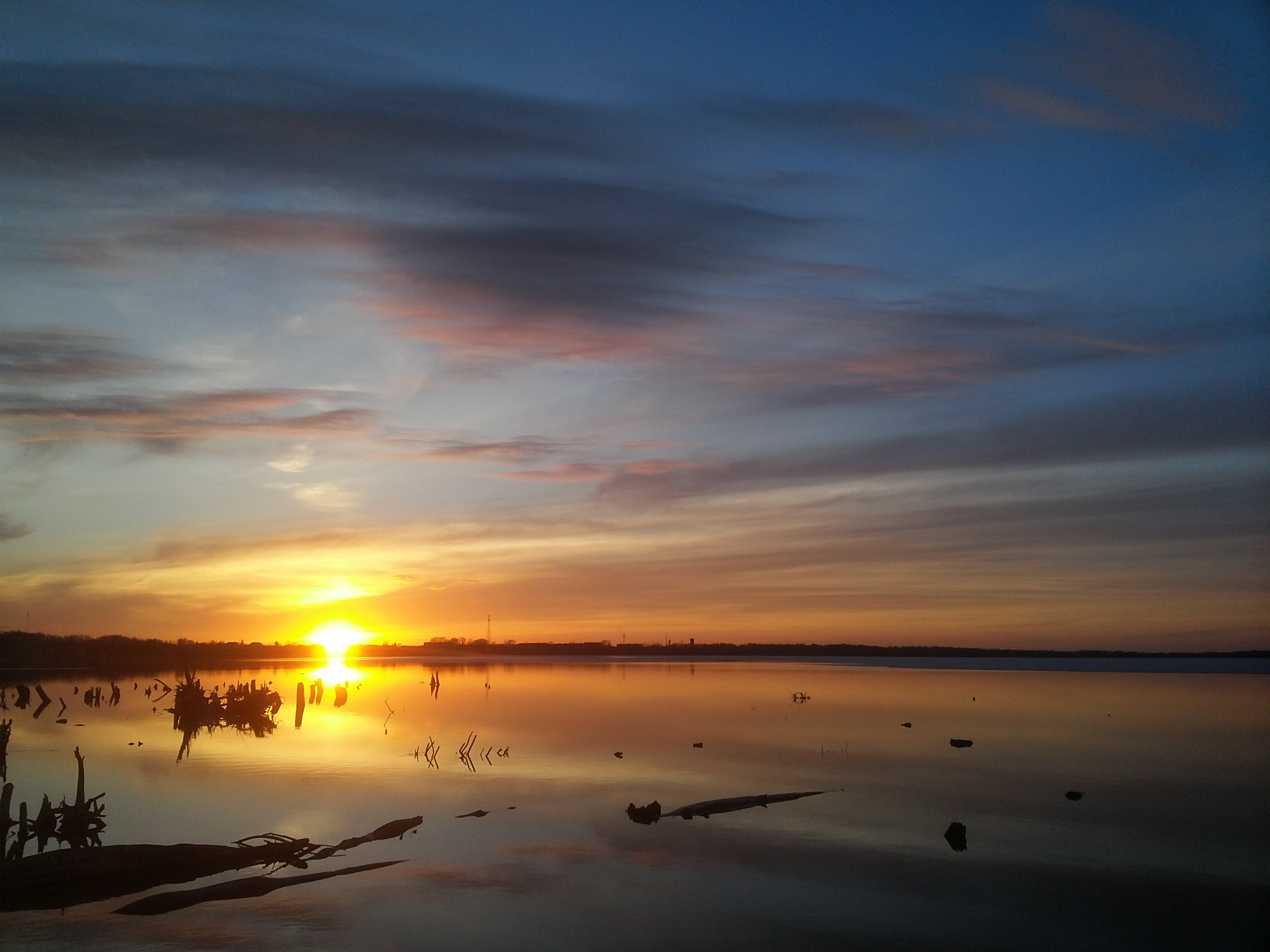 Озеро Сугояк, Красноармейский район This image is related to the protected area of Russia number 7410169